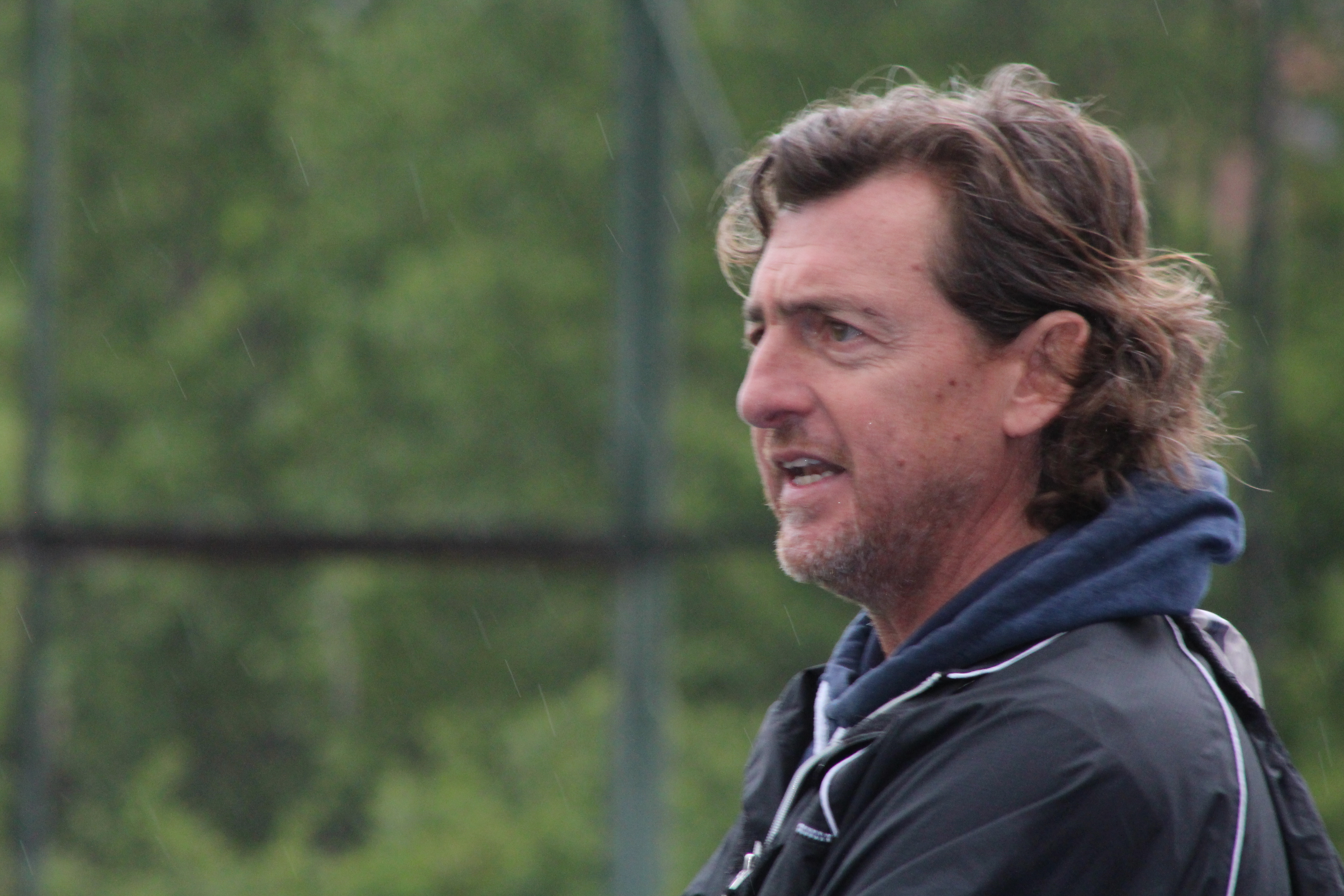 Fernando Ferrara